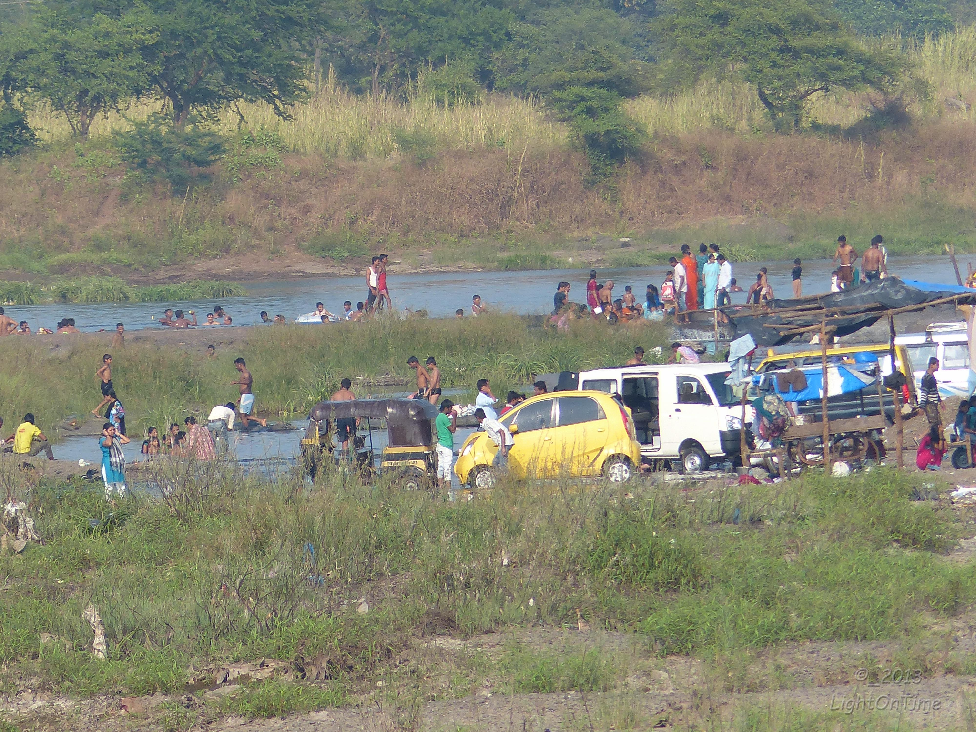 Ganeshpuri_Akloli_2013